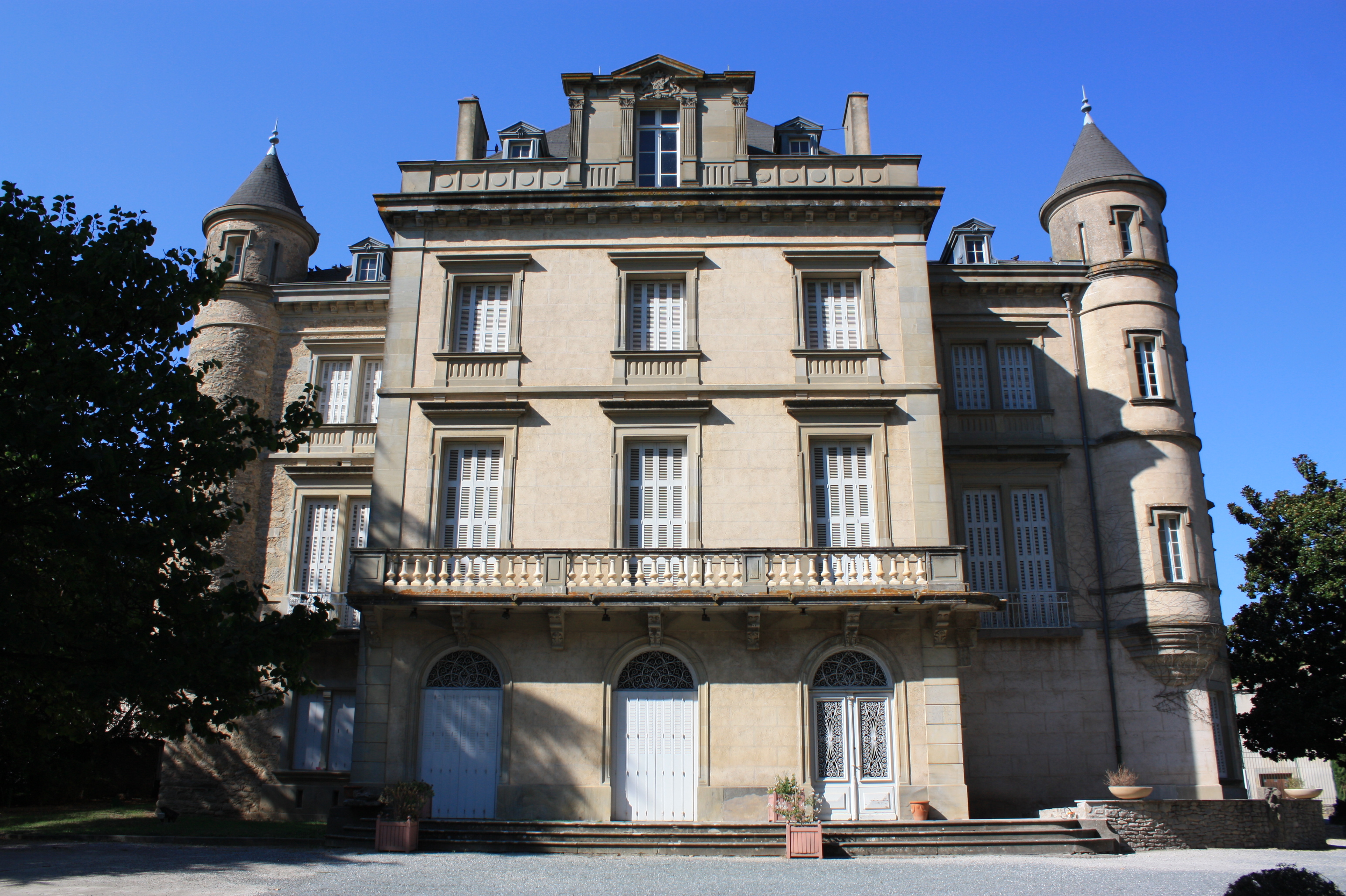 Château de Villegly, propriété du Conseil Général de l'Aude, parc ouvert au public